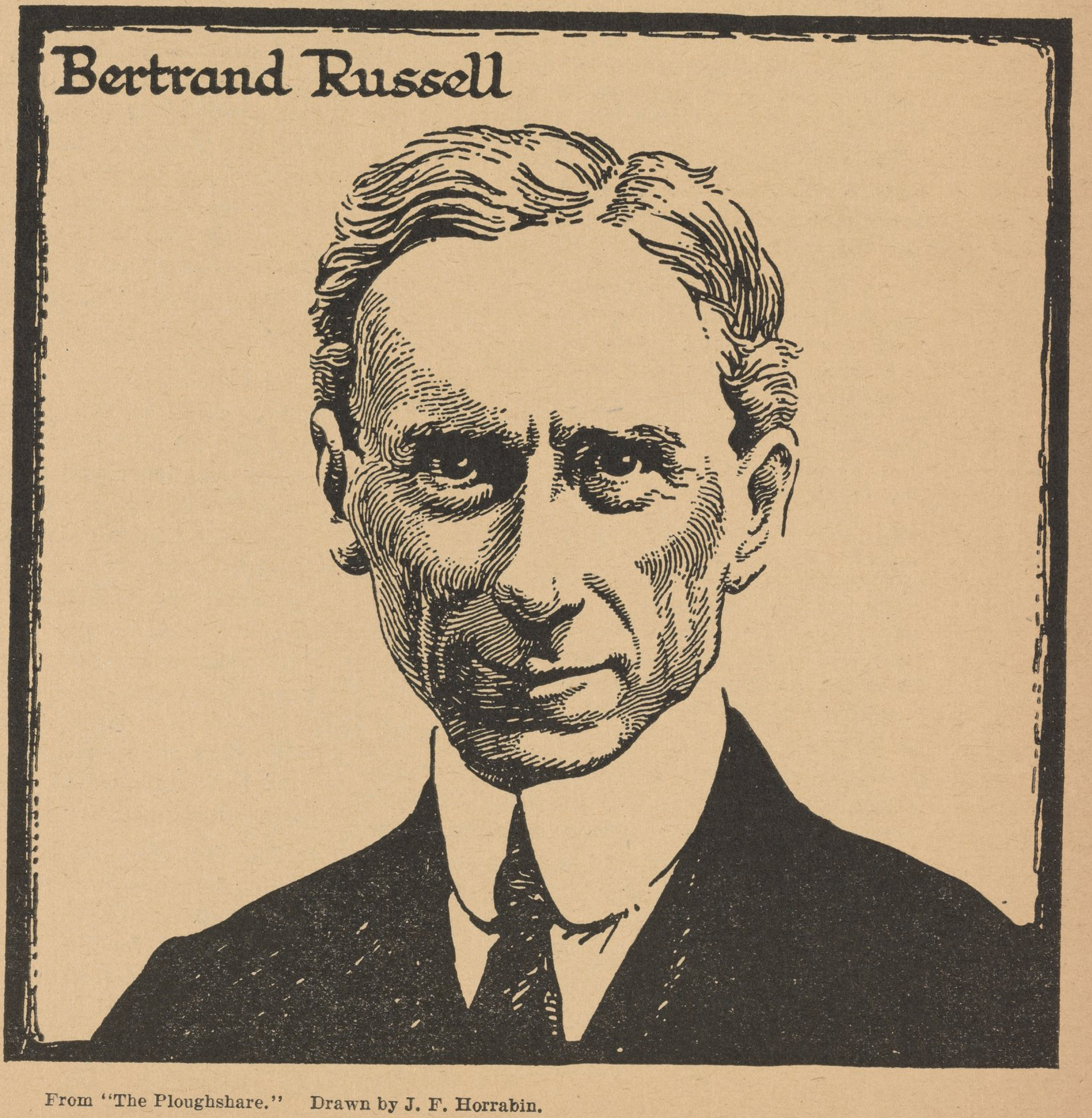 «Bertrand Russell», en el número de agosto de 1917 de The Masses.